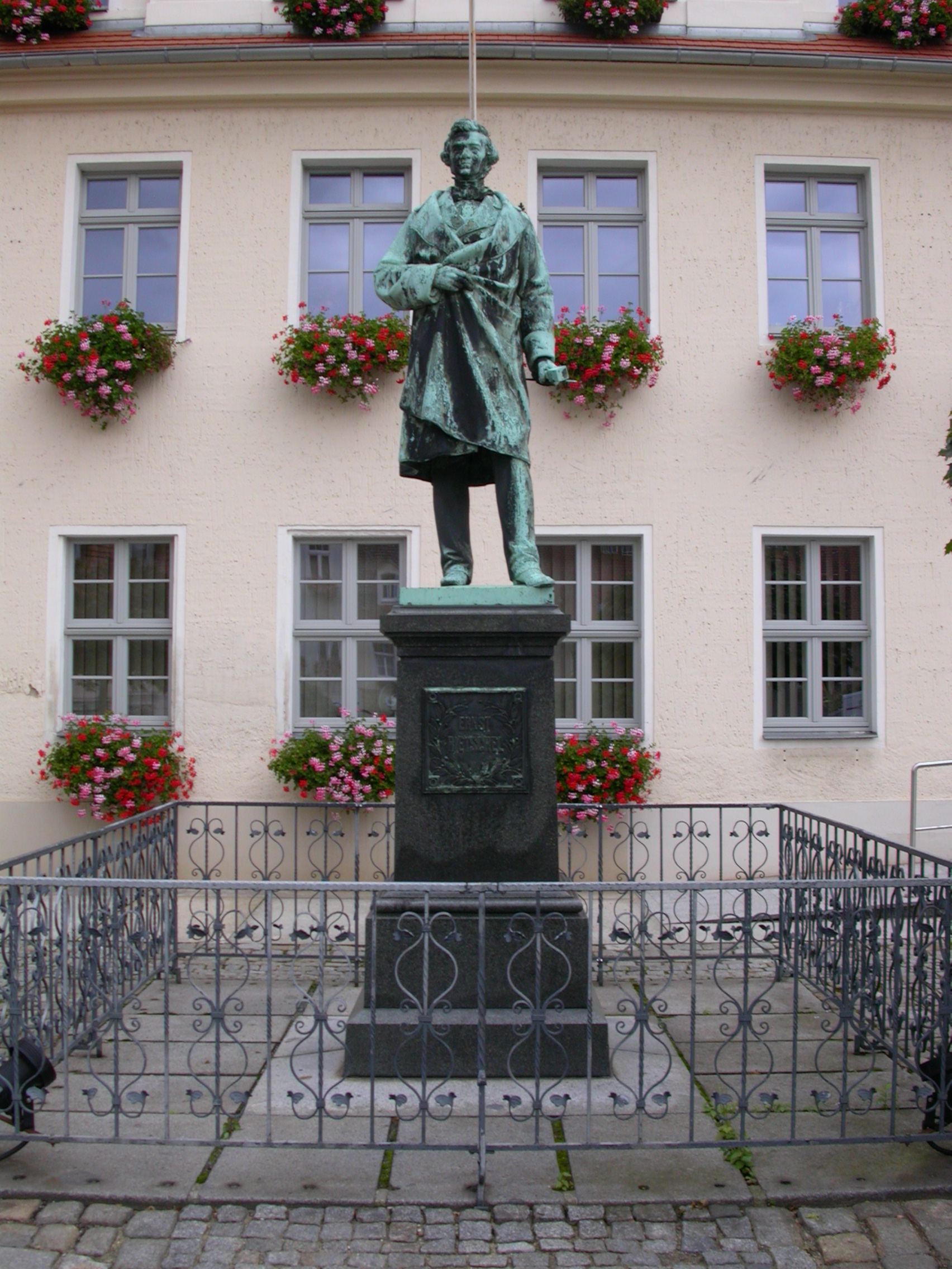 memorial for Ernst Rietschel in Pulsnitz